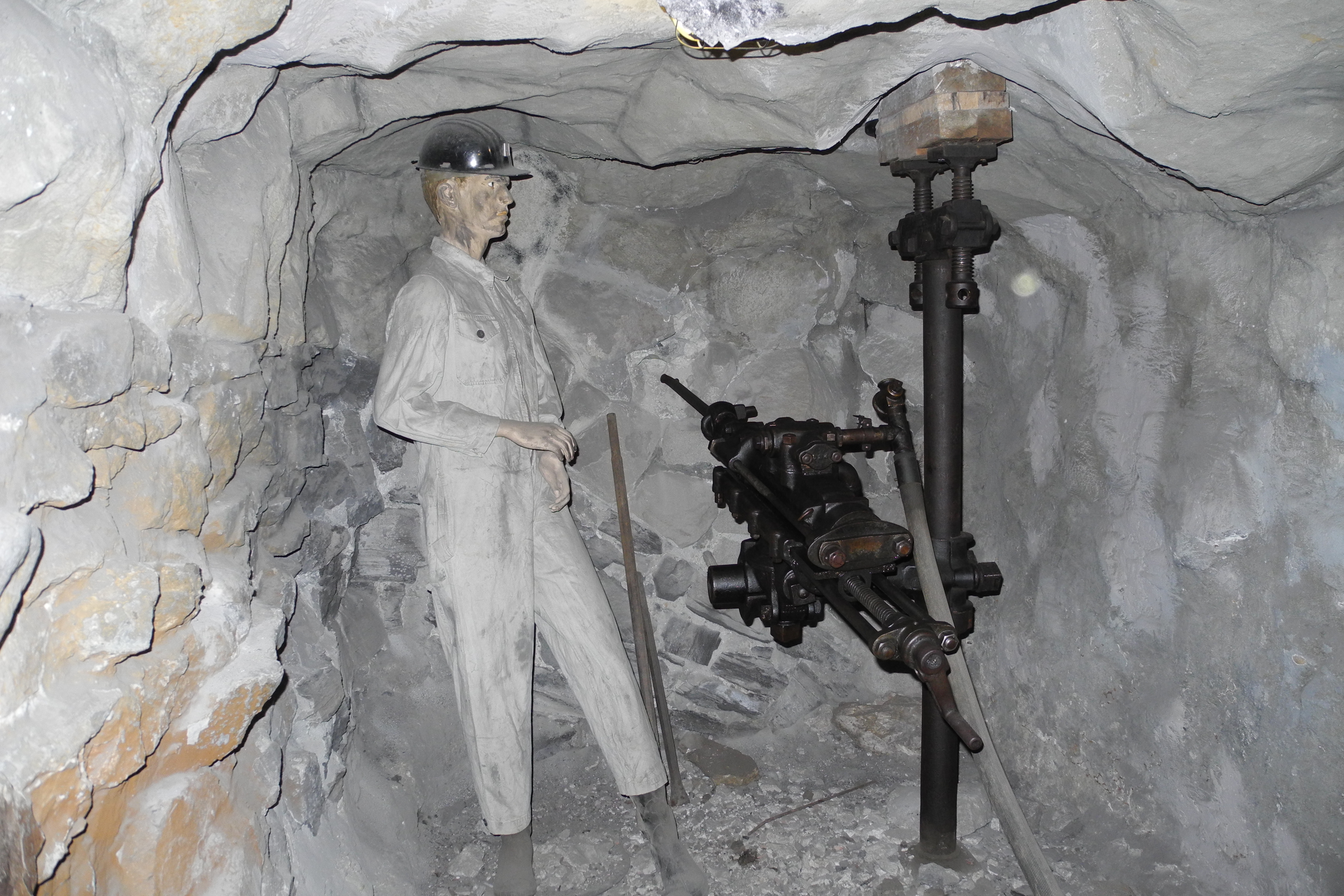 Bergwerk - Technisches Museum